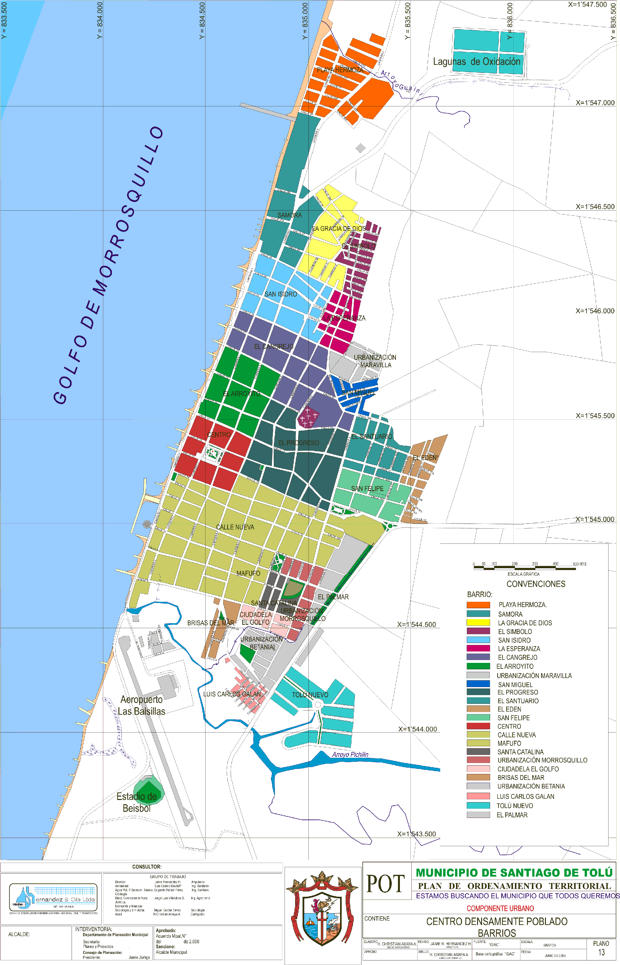 Mapa con la distribución de los distintos barrios y calles de Santiago de Tolú.